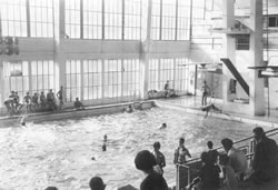 L'antiga piscina de la plaça del Doctor Trueta va desaparèixer quan es va inaugurar el complex poliesportiu de Can Felipa, després de les llargues reivindicacions veïnals.